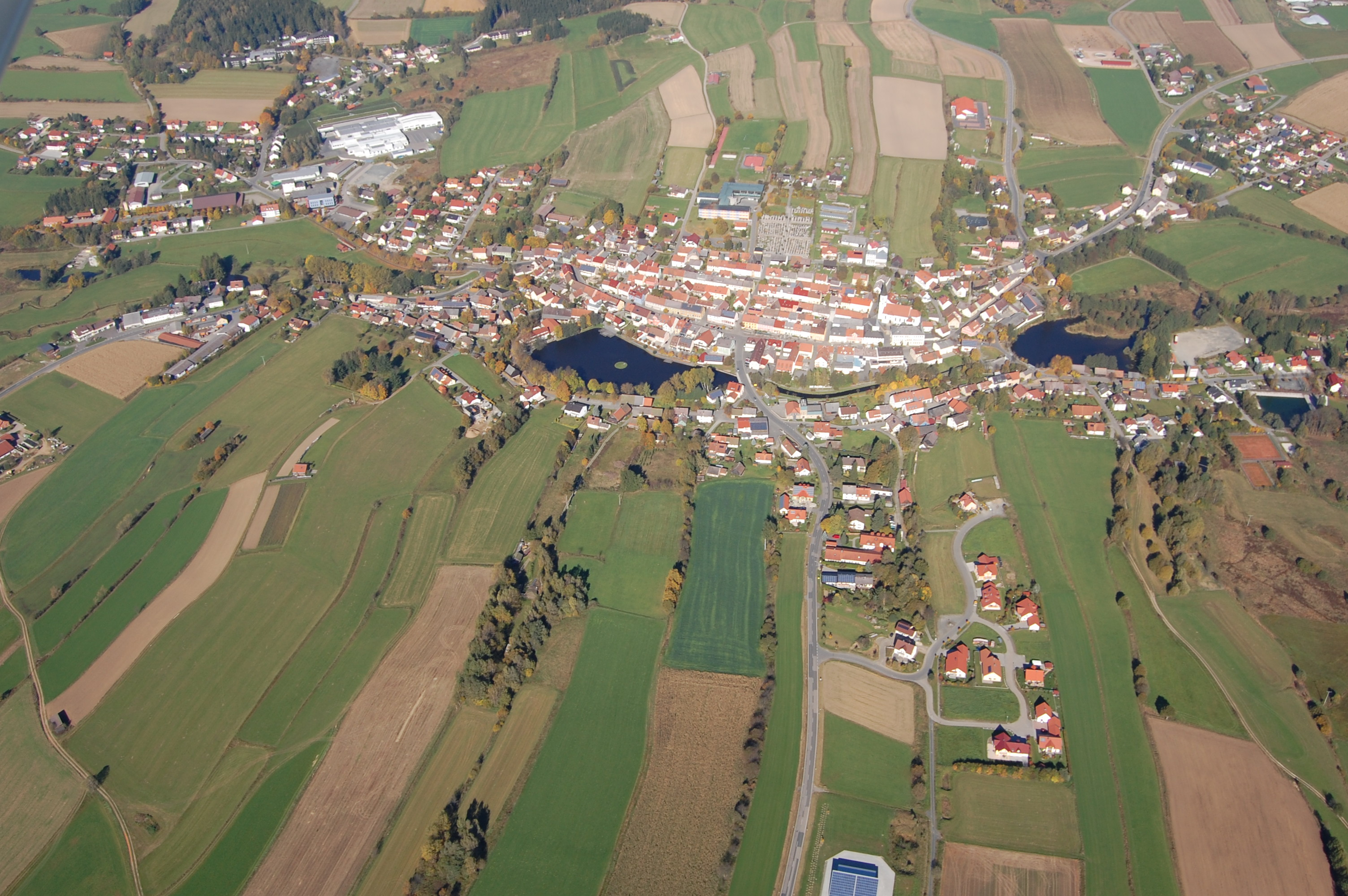 Schönsee